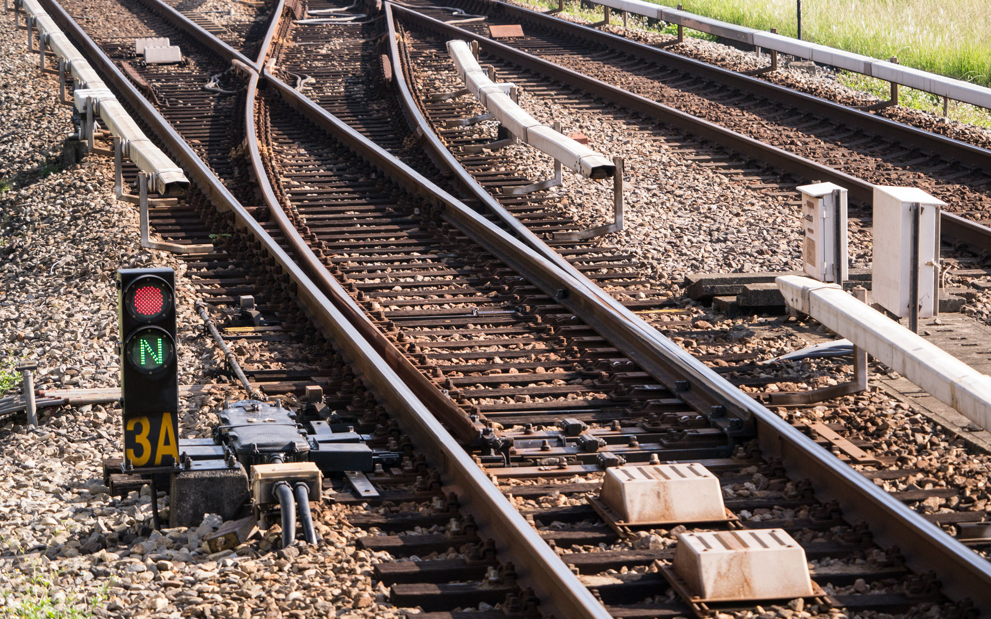 台北捷運